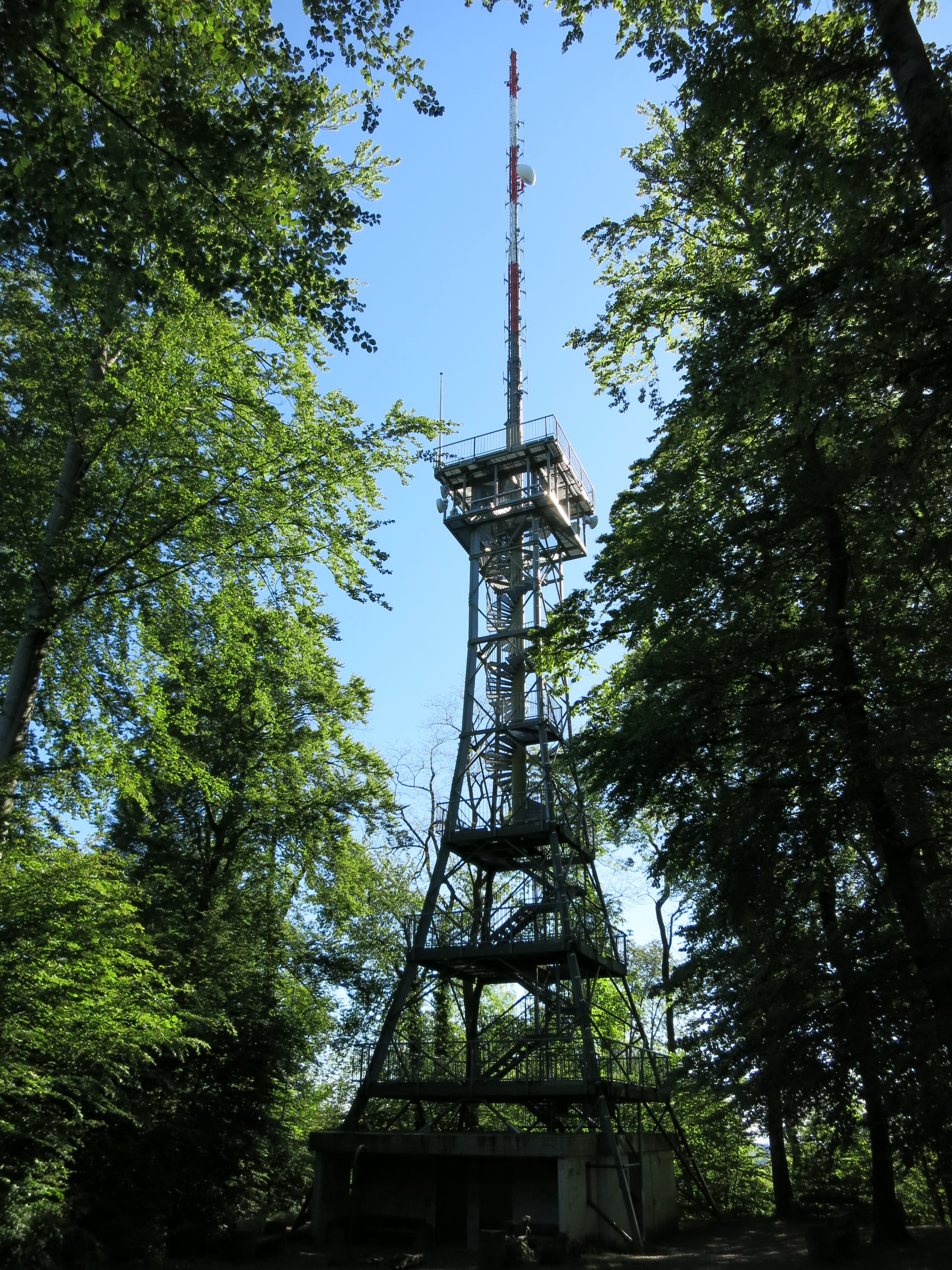 Irchelturm